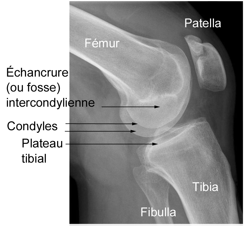 Cliché radiographique légendé